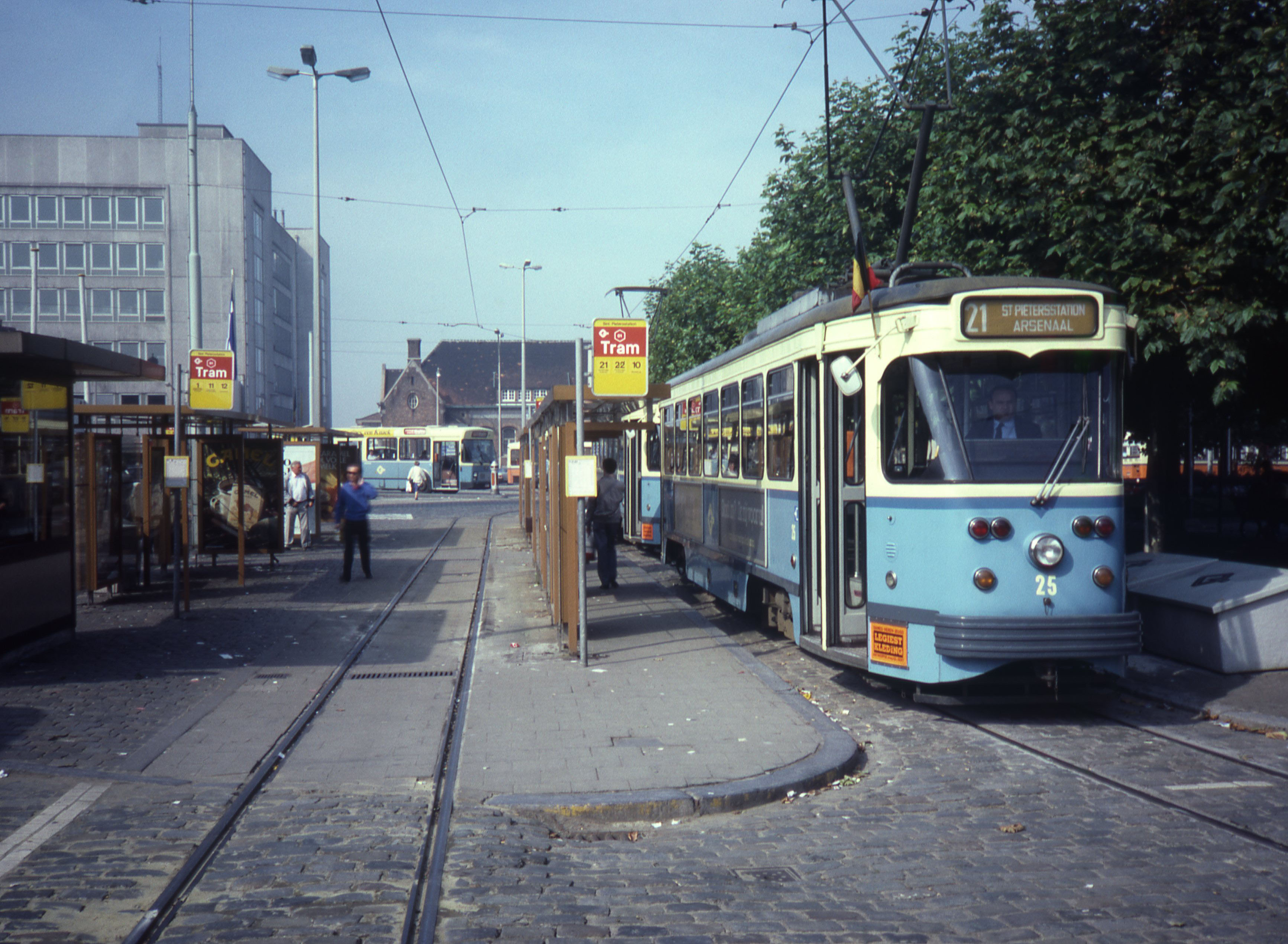 De MIVG tramlijn 21 bij Gent Sint Pieters station.